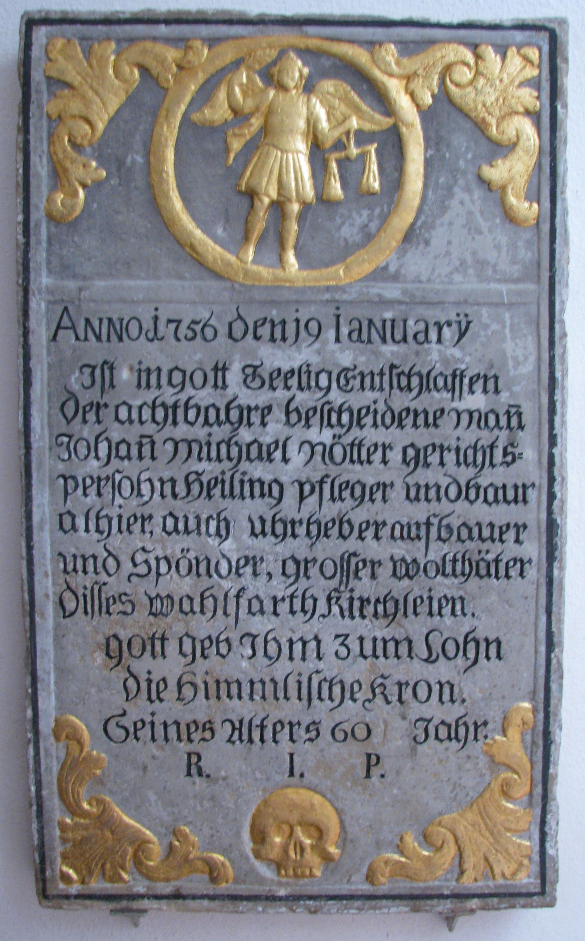 Linden, Ortsteil von Greding im mittelfränkischen Landkreis Roth in Bayern, Netter-Epitaph in der Mariahilf-Wallfahrtskirche